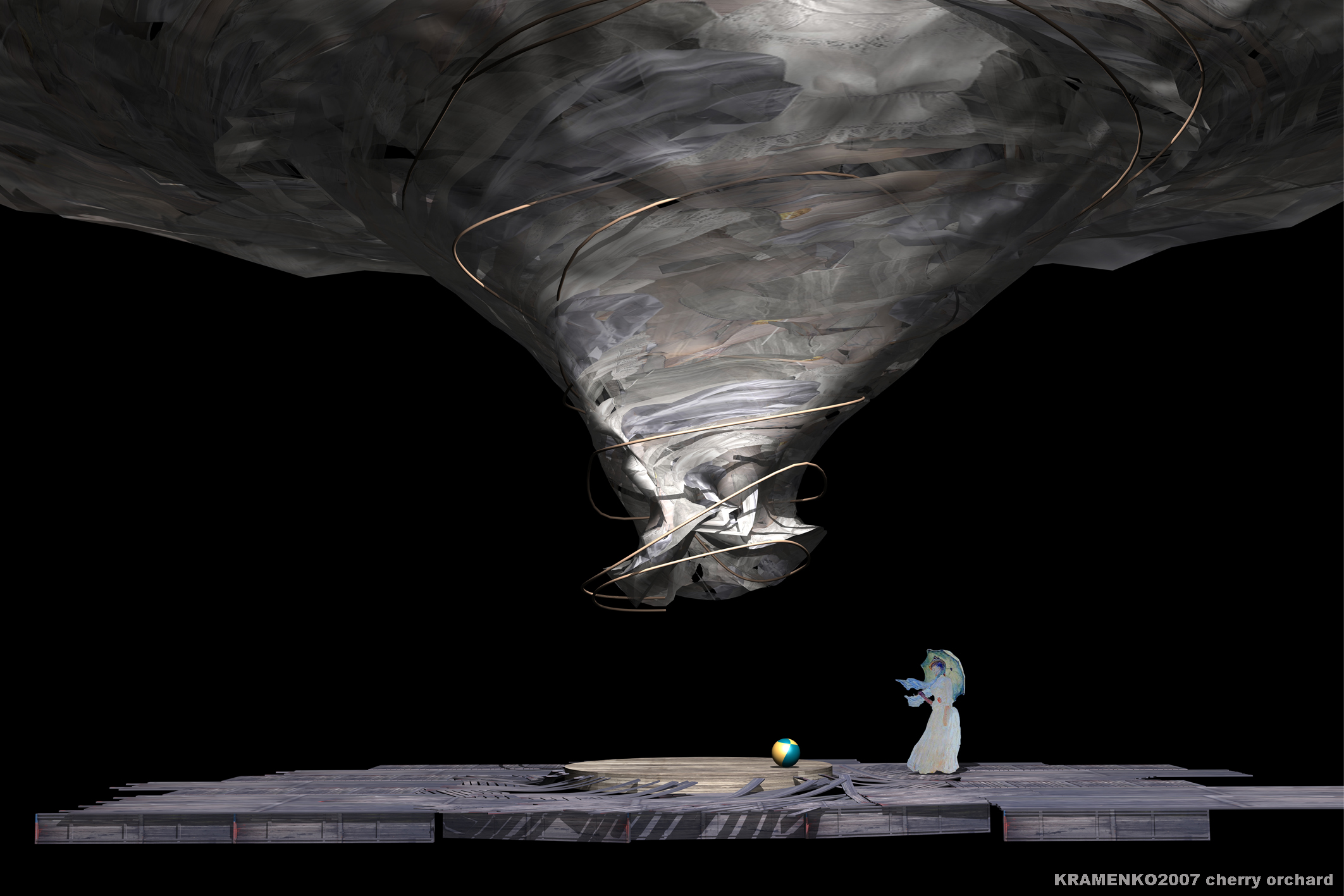 גן הדובדבנים, תיאטרון גשר